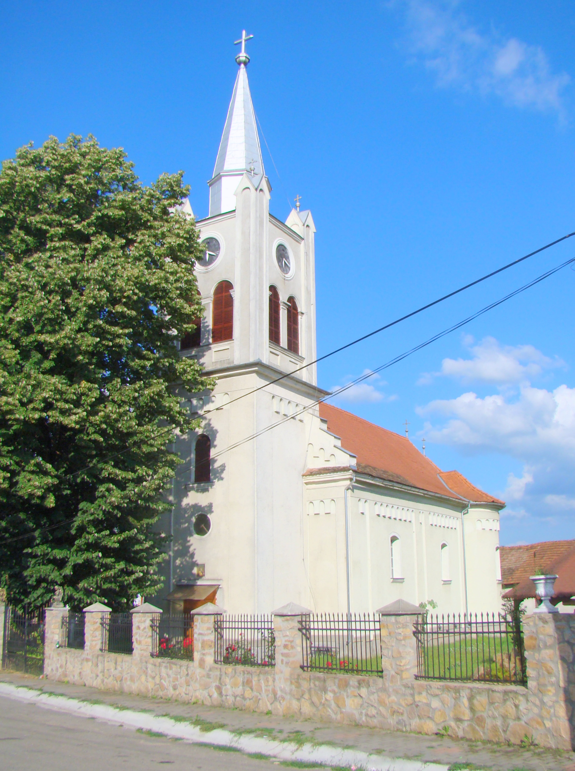 Biserica ortodoxă „Sf. Arhangheli Mihail și Gavriil”, sat Vadu Crișului; comuna Vadu Crișului